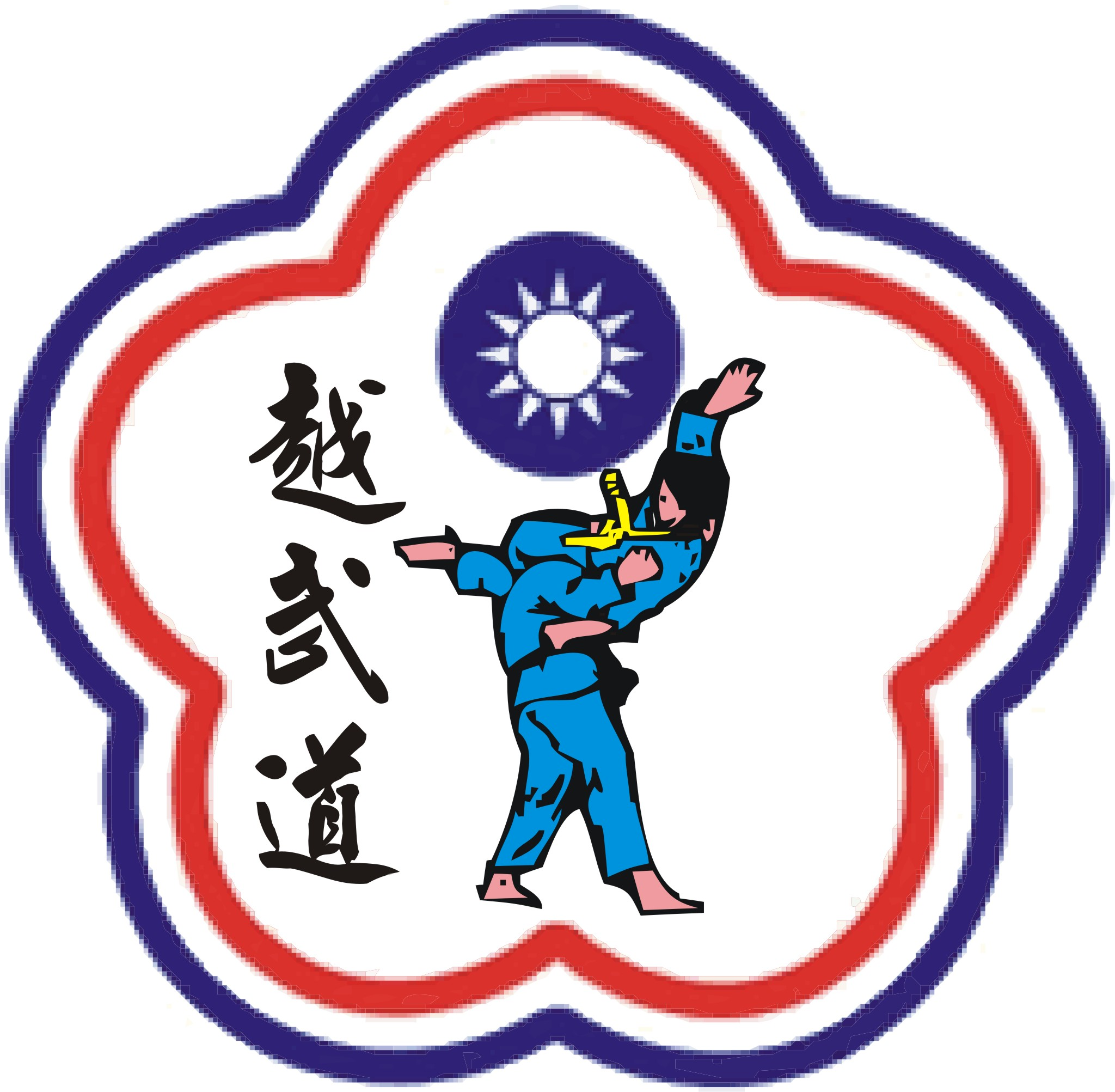 文言: 台灣越武道協會標誌